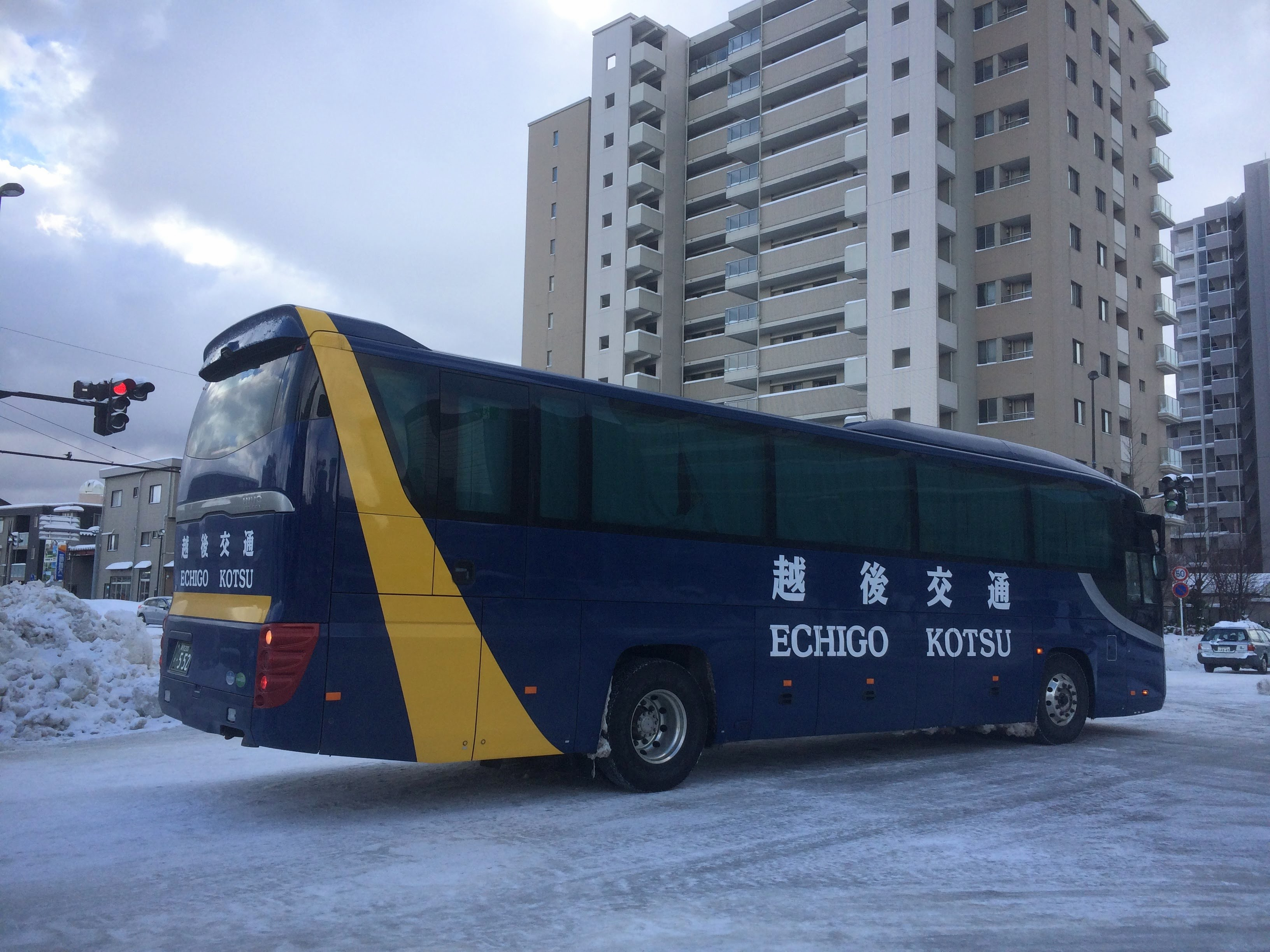 2008年に導入された夜行用の日野セレガ